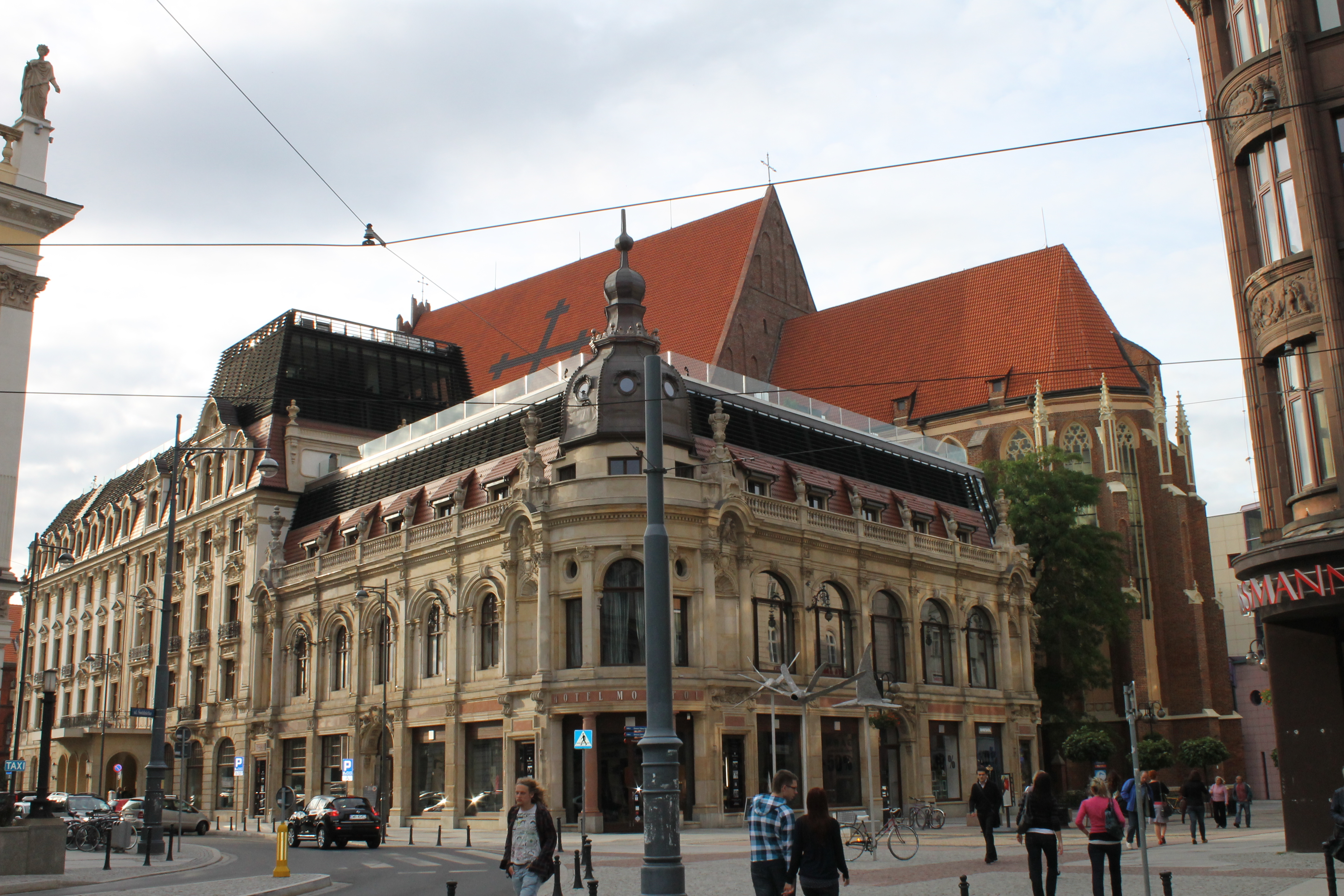 Hotel Monopol we Wrocławiu (259/431/Wm)